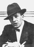 Julius Miloš Komárek (1892 - 1955), Český učitel, vědec, spisovatel.